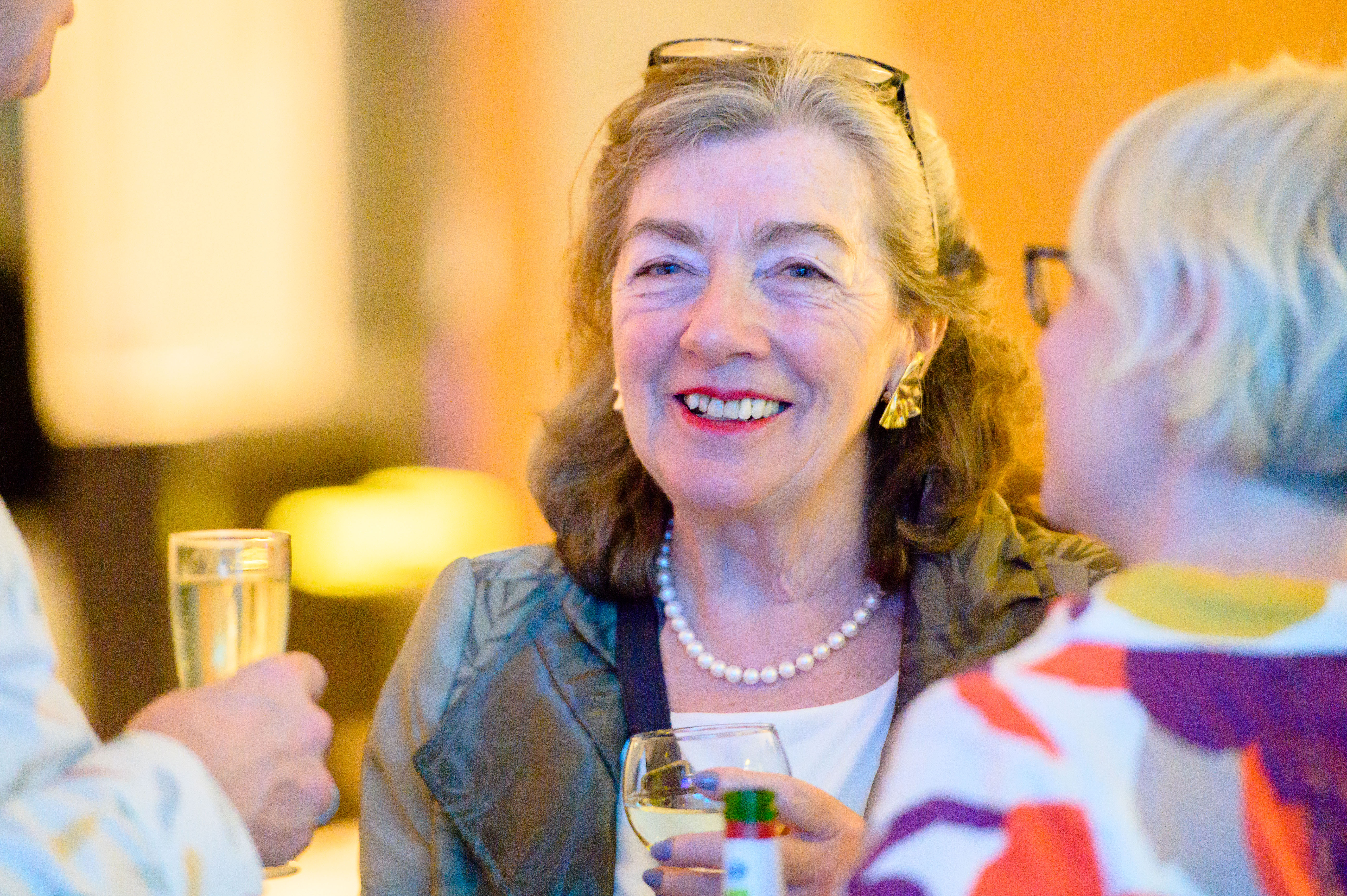 Michaele Schreyer (Bündnis90/Die Grünen) Foto: Stephan Röhl